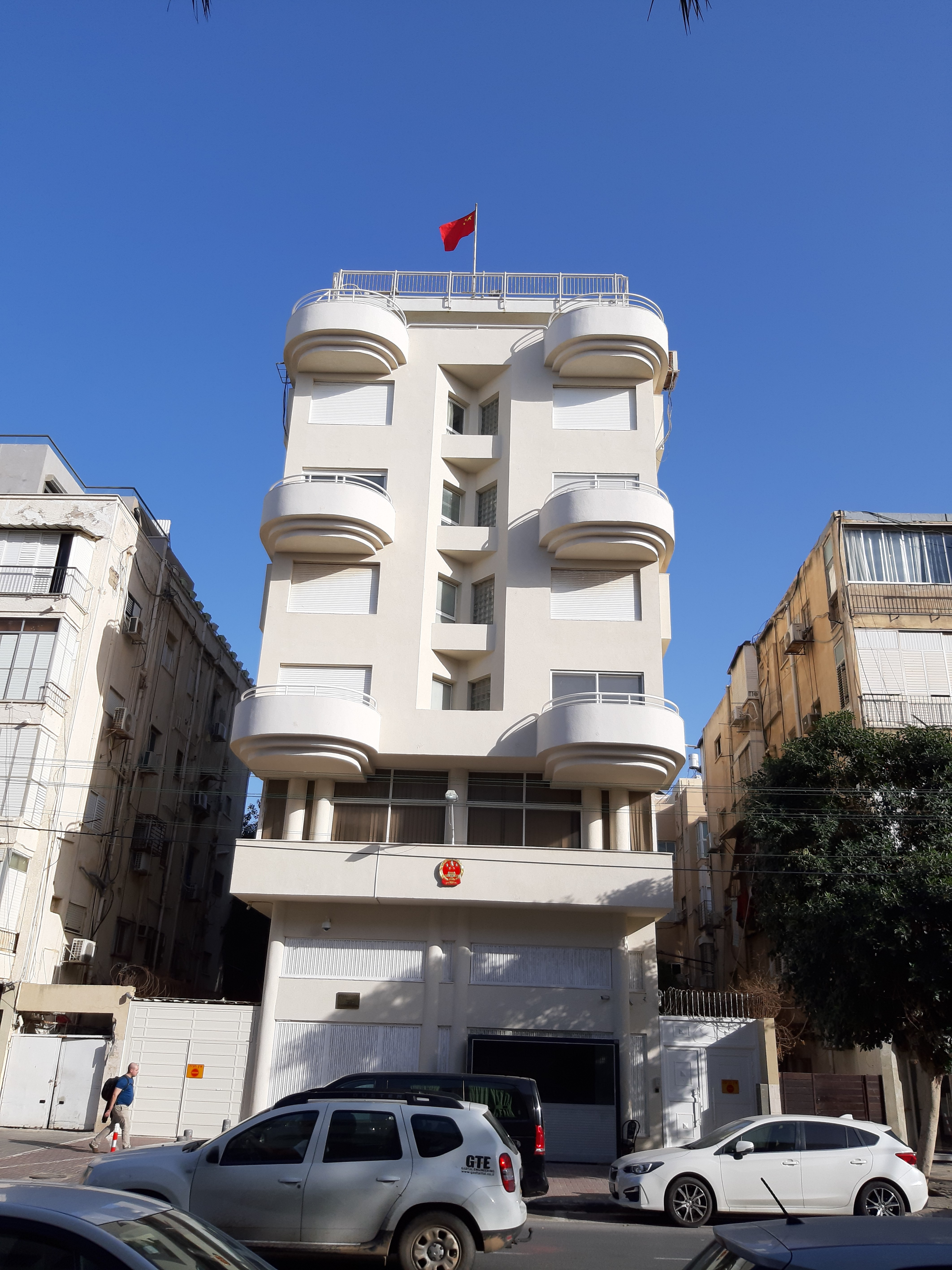 שגרירות סין בישראל, רחוב בן יהודה 222 תל אביב